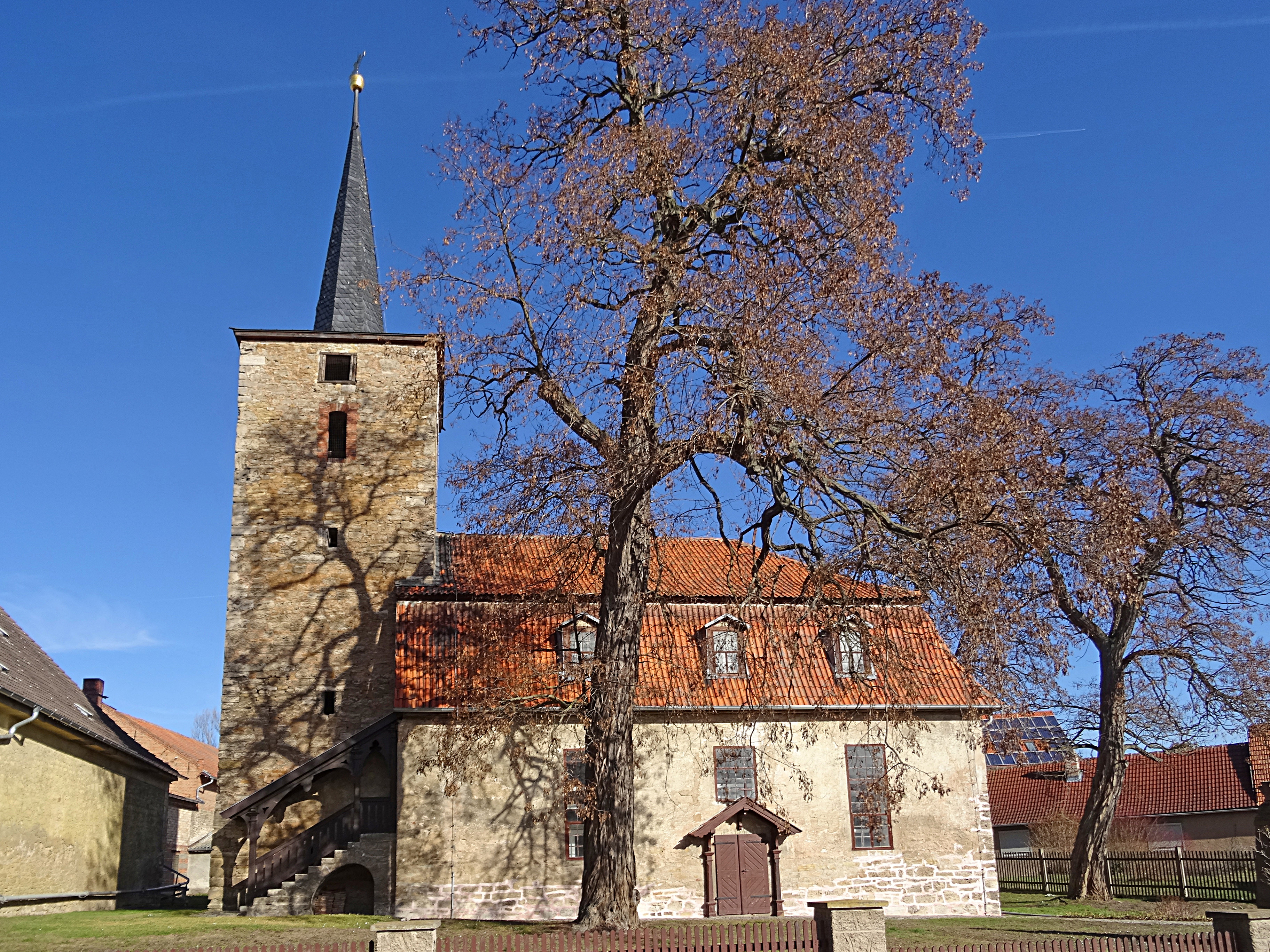 Dorfkirche St. Pankratius in Niedertopfstedt von Süden